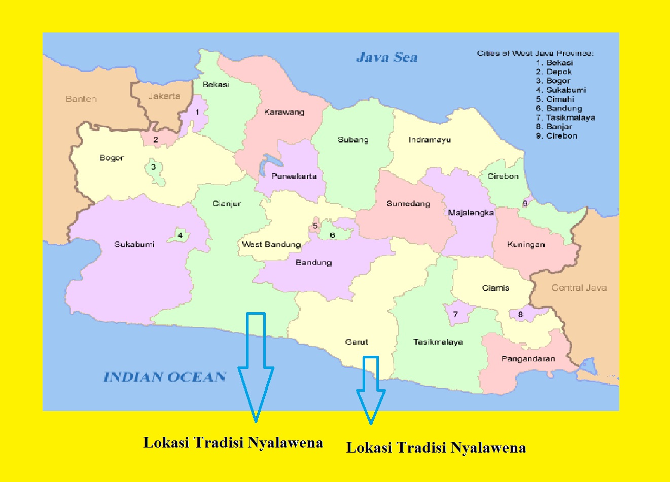 Peta Penyebaran Tradisi Nyalawena Cianjur dan Garut